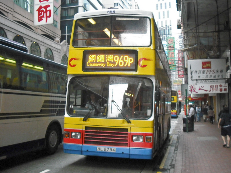 中文（香港）: 城巴969P線巴士，攝於香港灣仔軒尼詩道近莊士敦道路口。